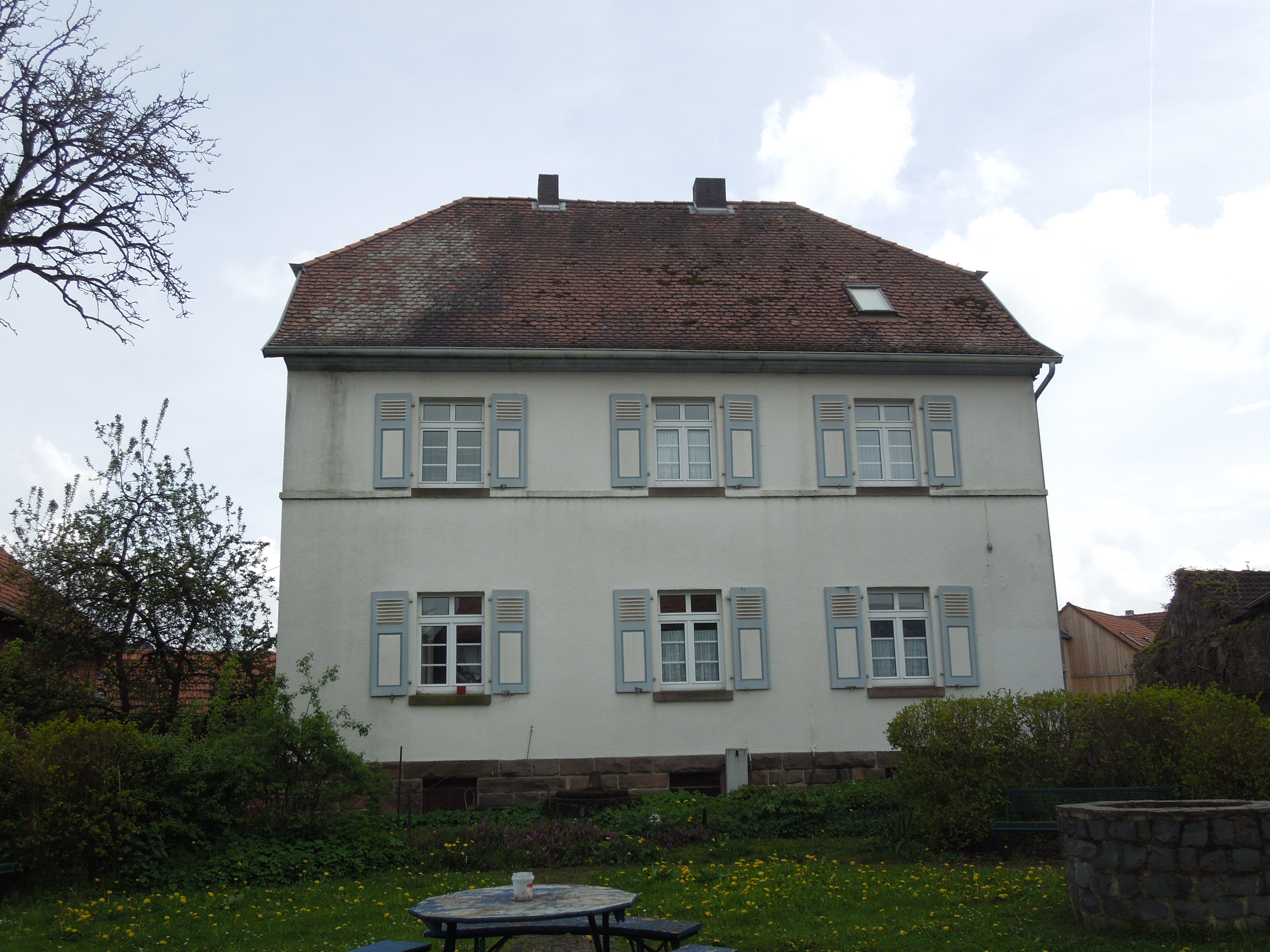 Moischeid: Das sogenannte Pächterhaus des ehemaligen Adelshofes